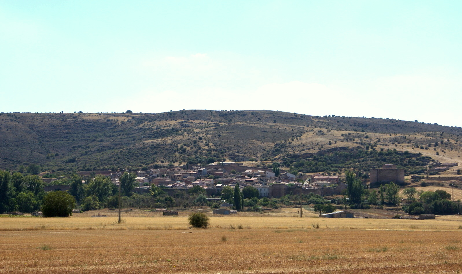 Panorámica de la Villa de Palazuelos, Sigüenza, Guadalajara, siglo XV.